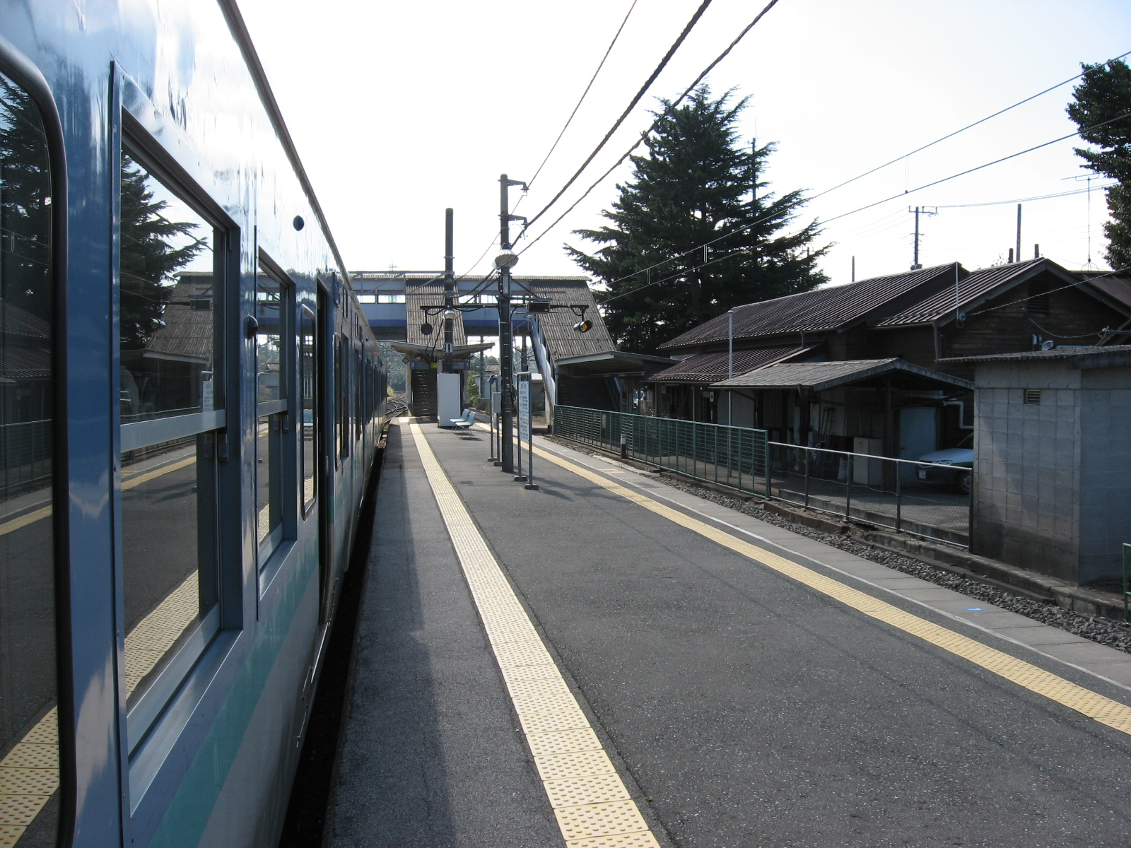 中央本線 日野春駅ホーム